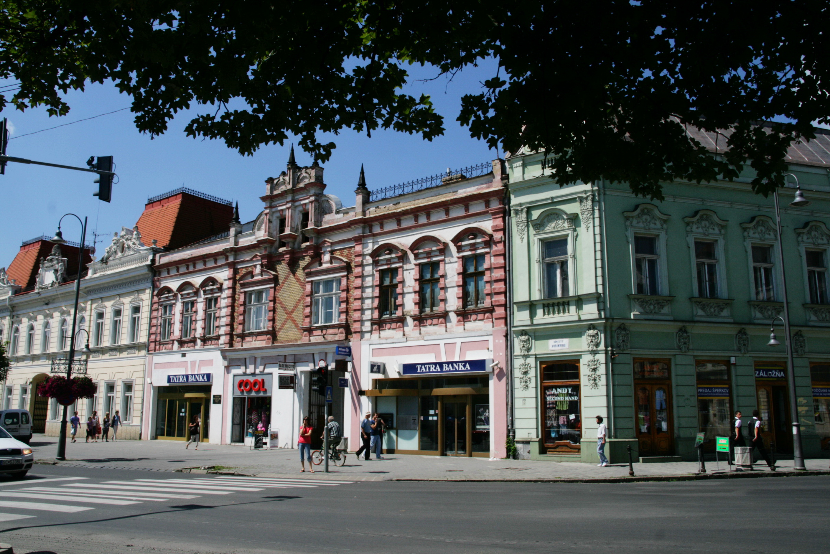 Losonc - Kubínyi tér - nyugati házsor